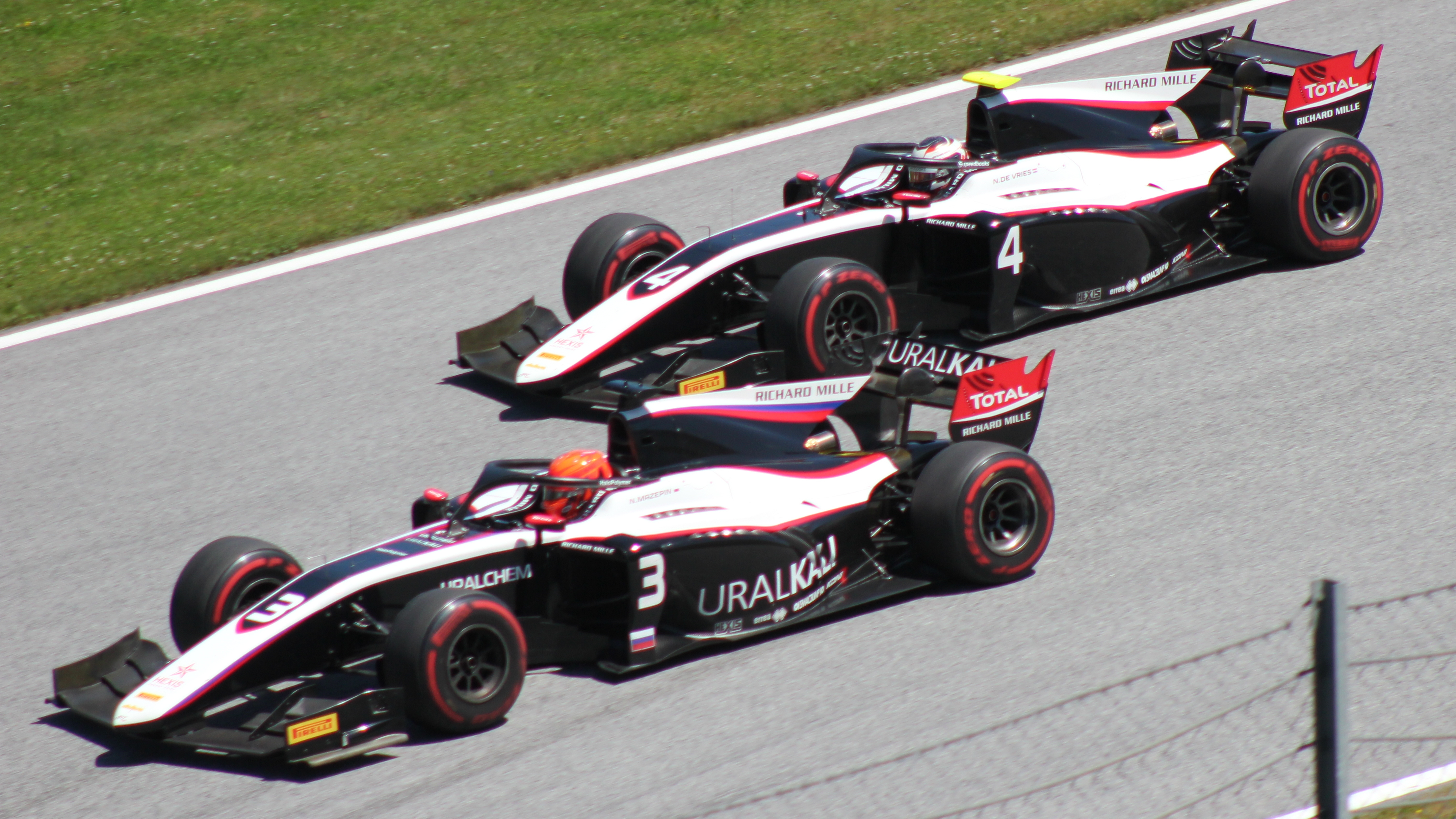 Beide ART beim Rennwochenende in Österreich 2019